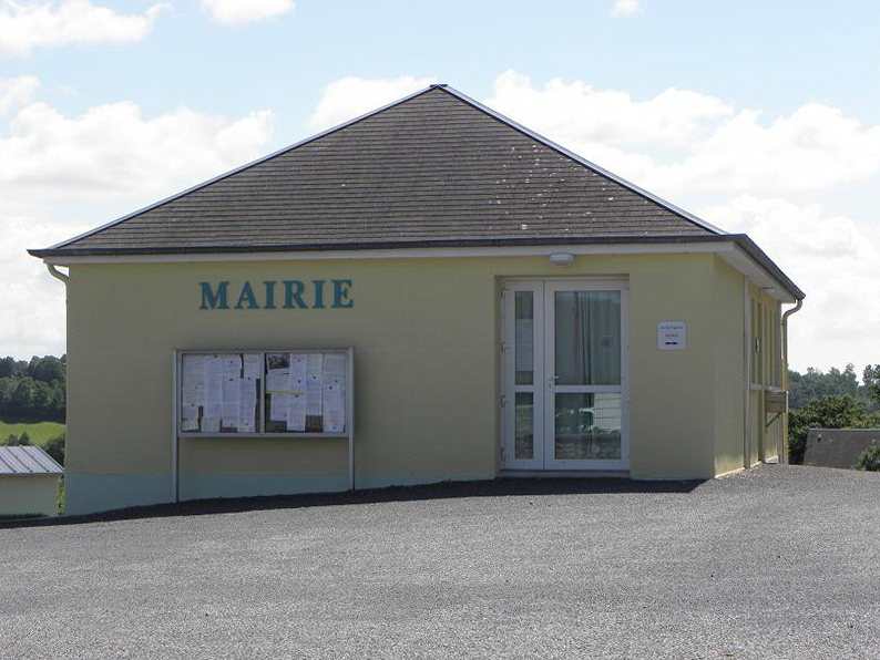 Mairie de Saussey (50).